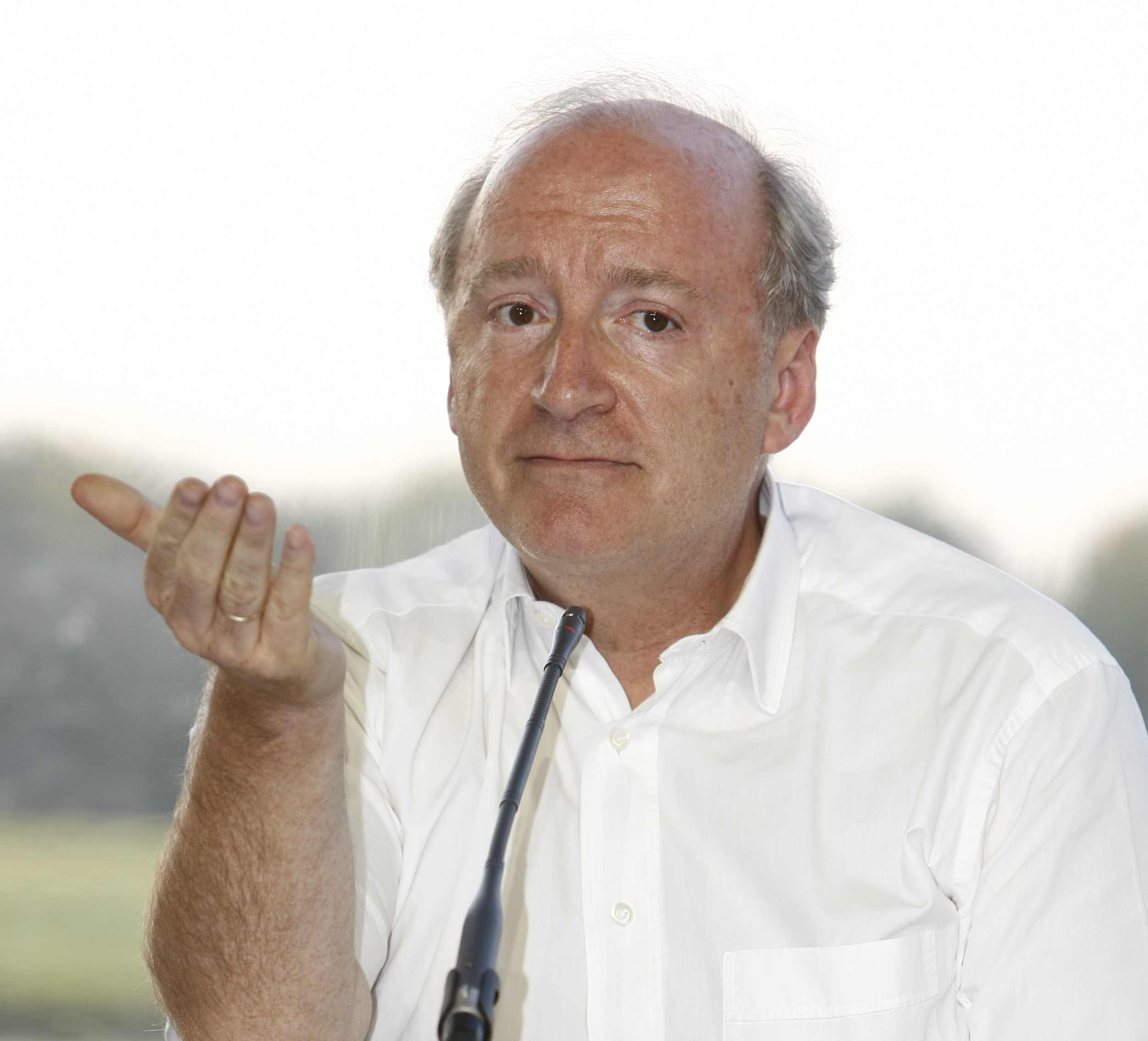 Hubert Védrine, former French minister for Foreign Affairs